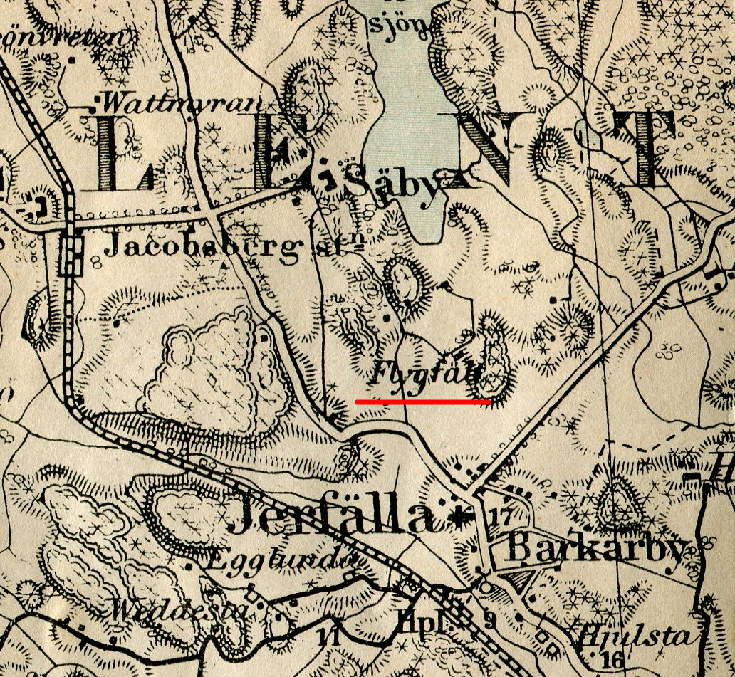 Barkarby flygfält på en karta från 1913